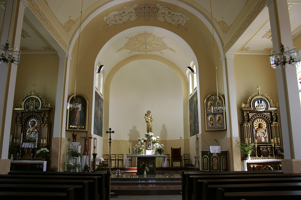 Kościól św. Antoniego Padewskiego w Zgoniu (woj. ślaskie), praca wlasna 2006